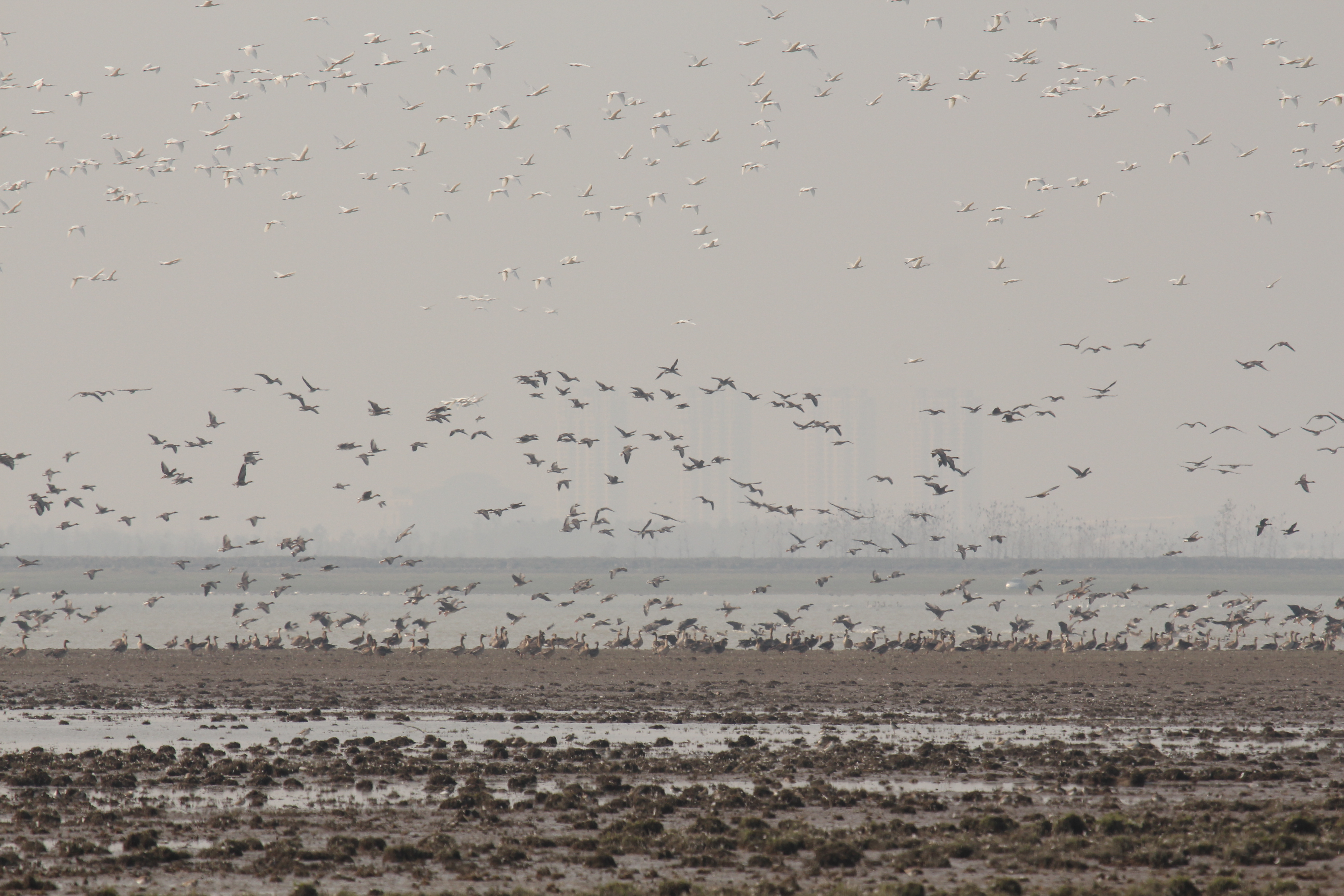 Geese, swans, spoonbills and cranes. 鸟类在鄱阳湖